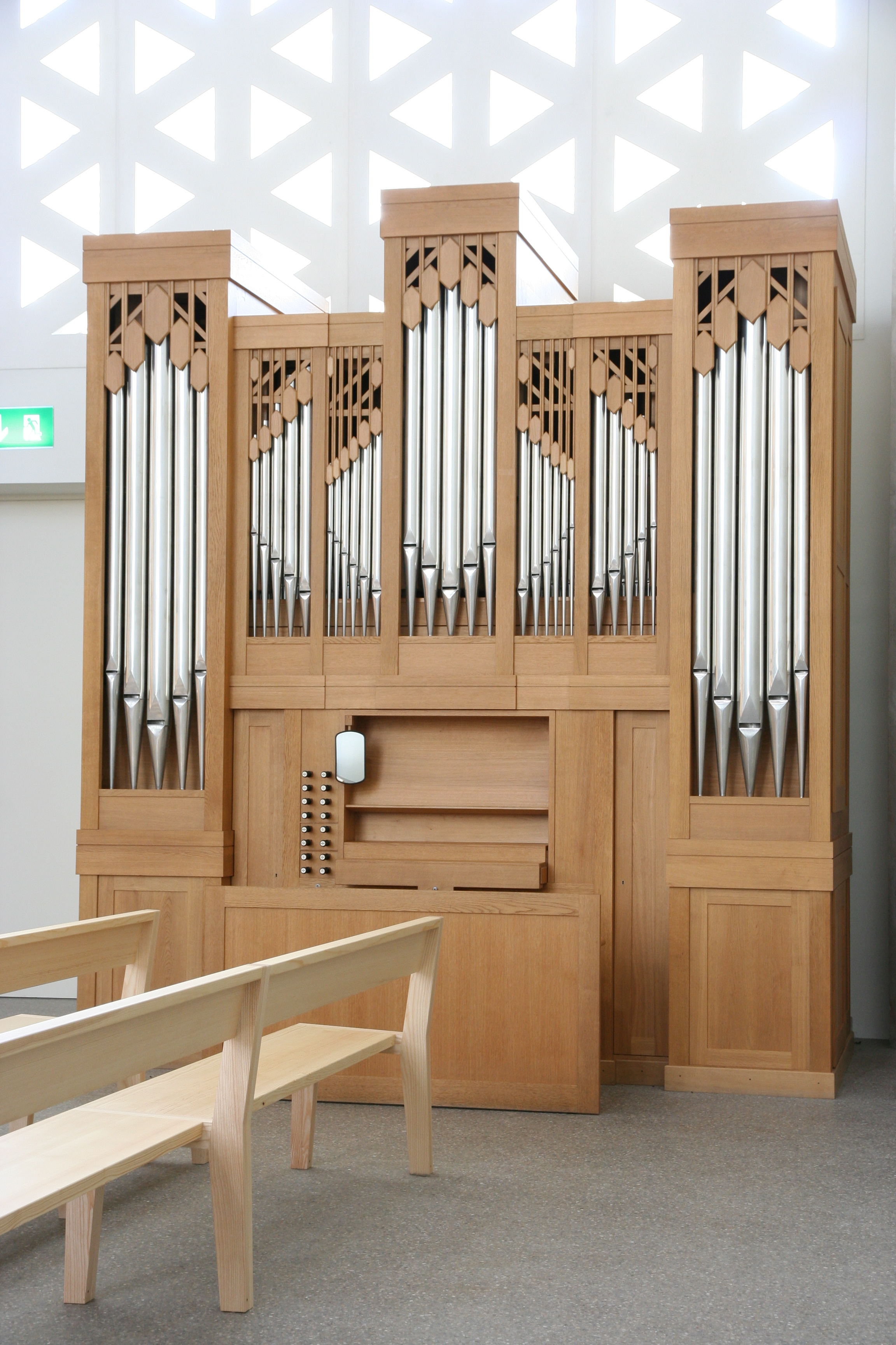 röm.-kath. Kirche St. Mauritius Bonstetten vom 2016